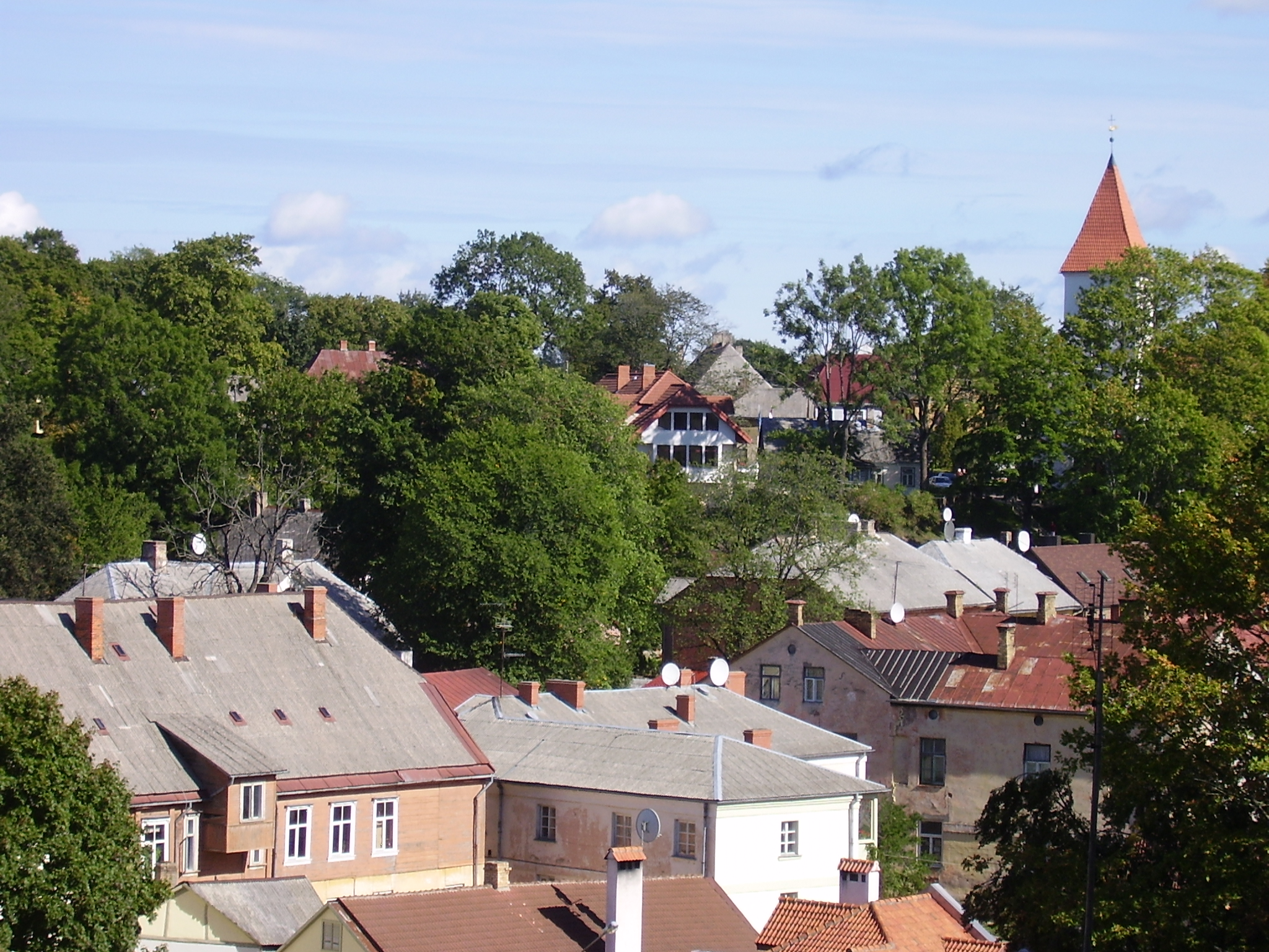 Talsi in Latvia...